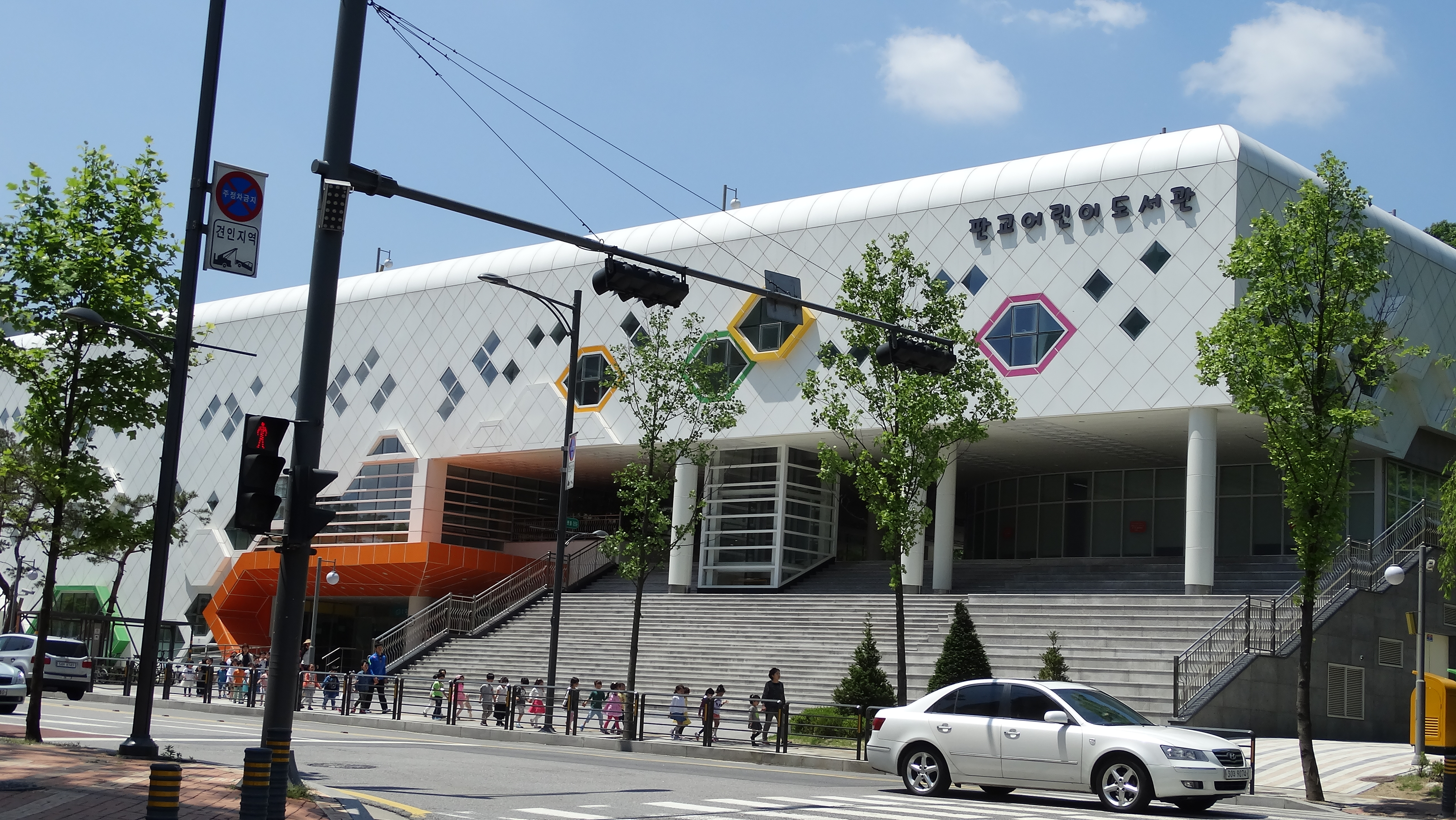 판교어린이도서관 (1)